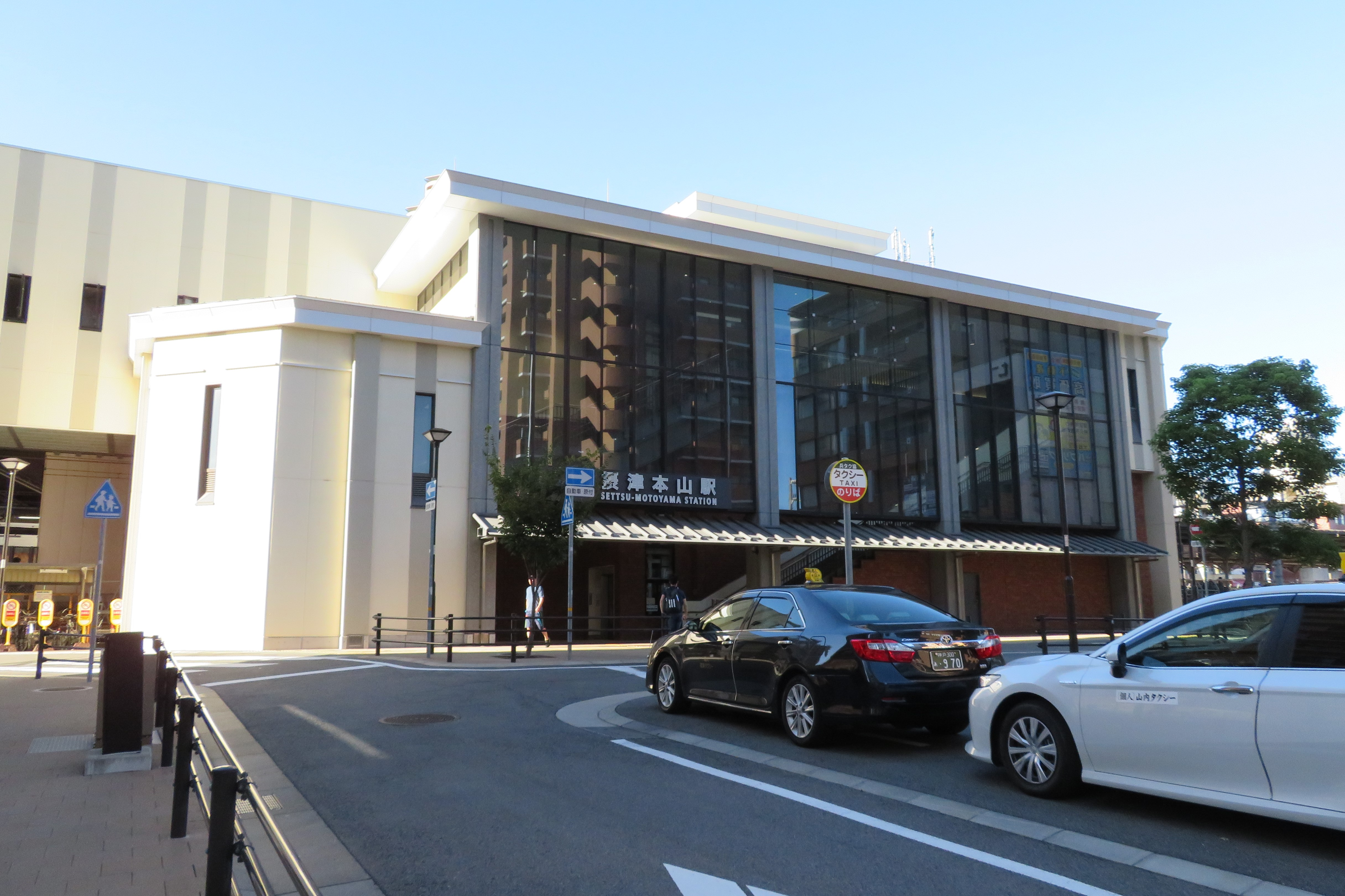 JR摂津本山駅南口